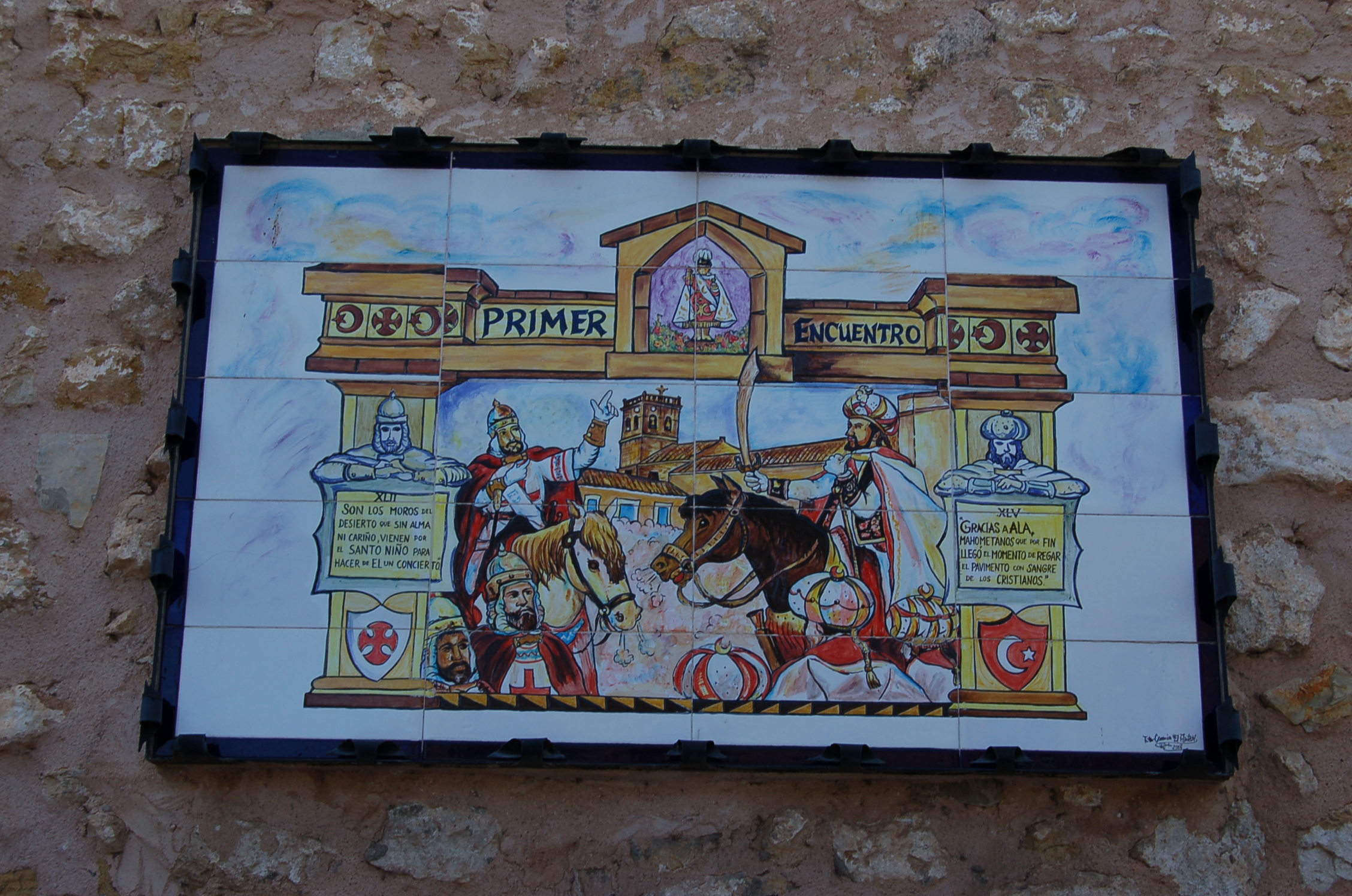 Placa Primer encuentro Moros y Cristianos Valverde de Júcar